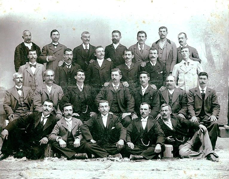 Снимка на техническия състав на Българско акционерно дружество за направа на Варненското пристанище.